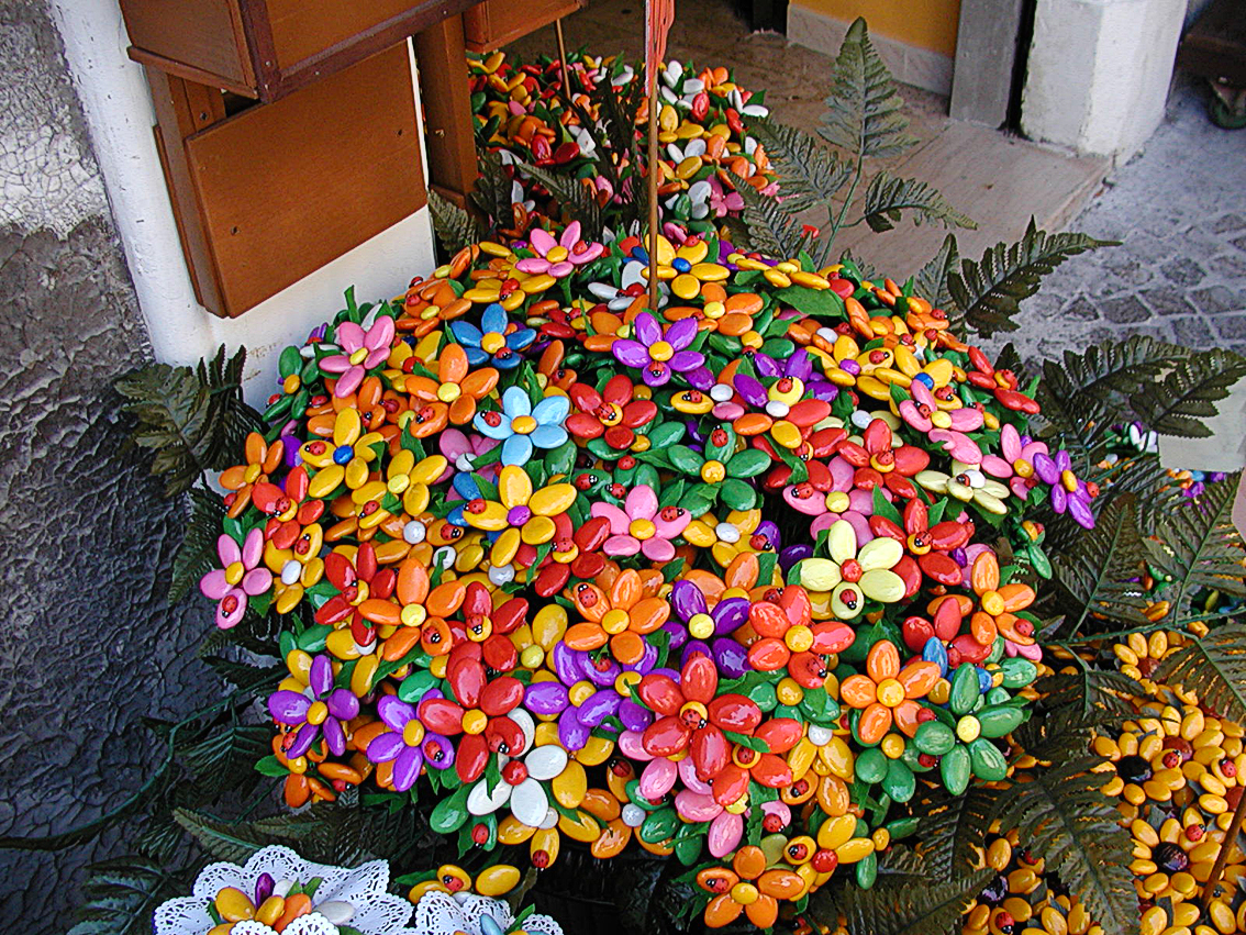 Confetti di Sulmona